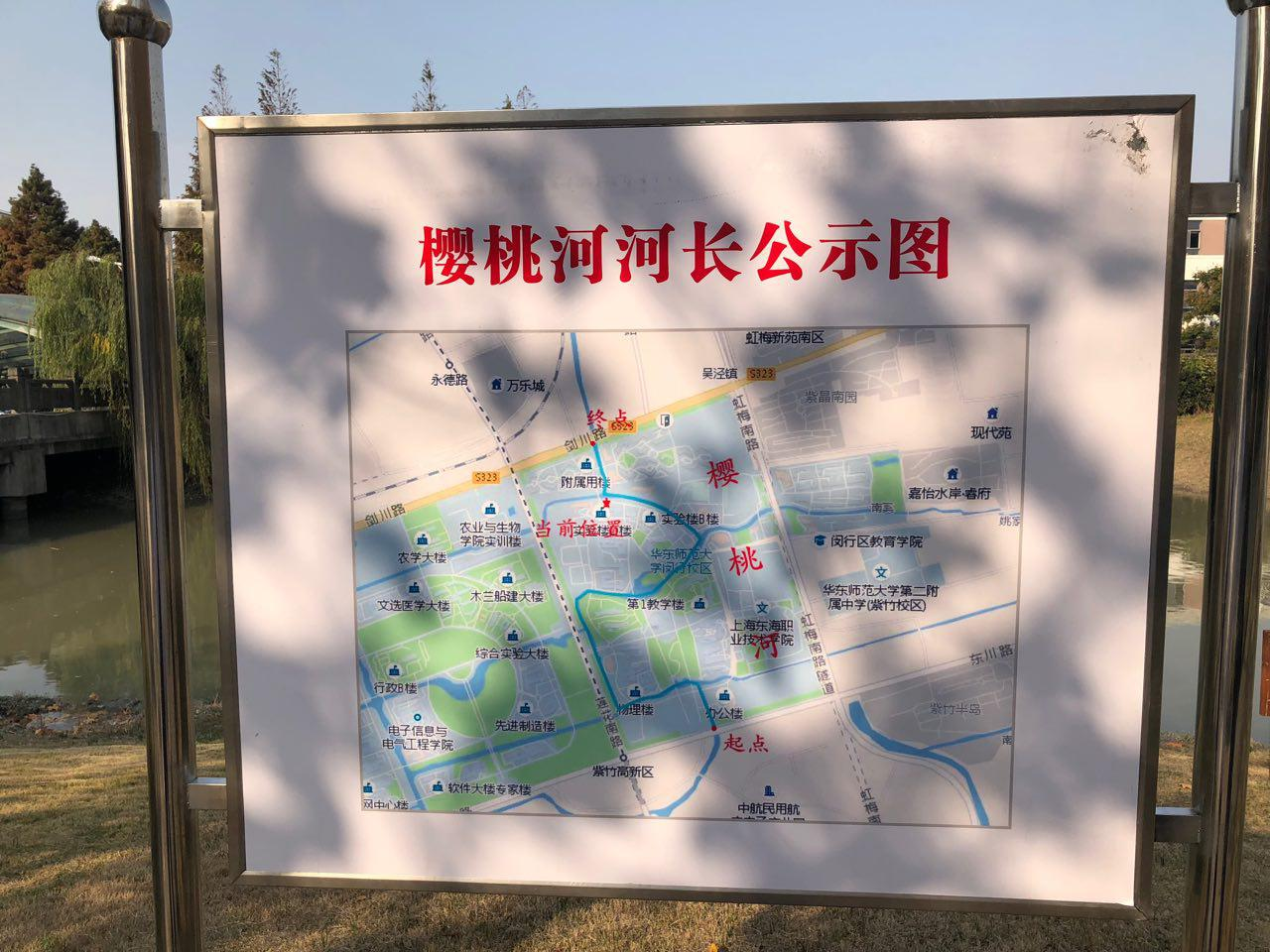 中文（中国大陆）: 樱桃河河长公示图，由吴泾镇人民政府设立。